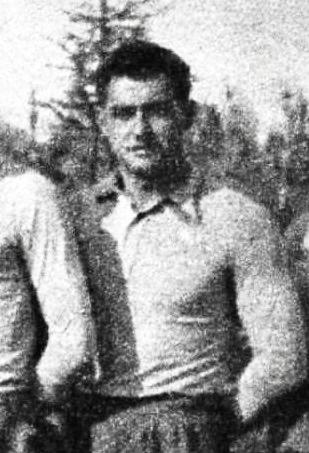 Guy Basquet en mars 1943, vice-champion de France de rugby avec le SU Agen.